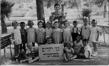 צילום קבוצתי של ילדי גן ילדים ממנחמיה, כולל ילדי גרעין ירושלים בטבריה.